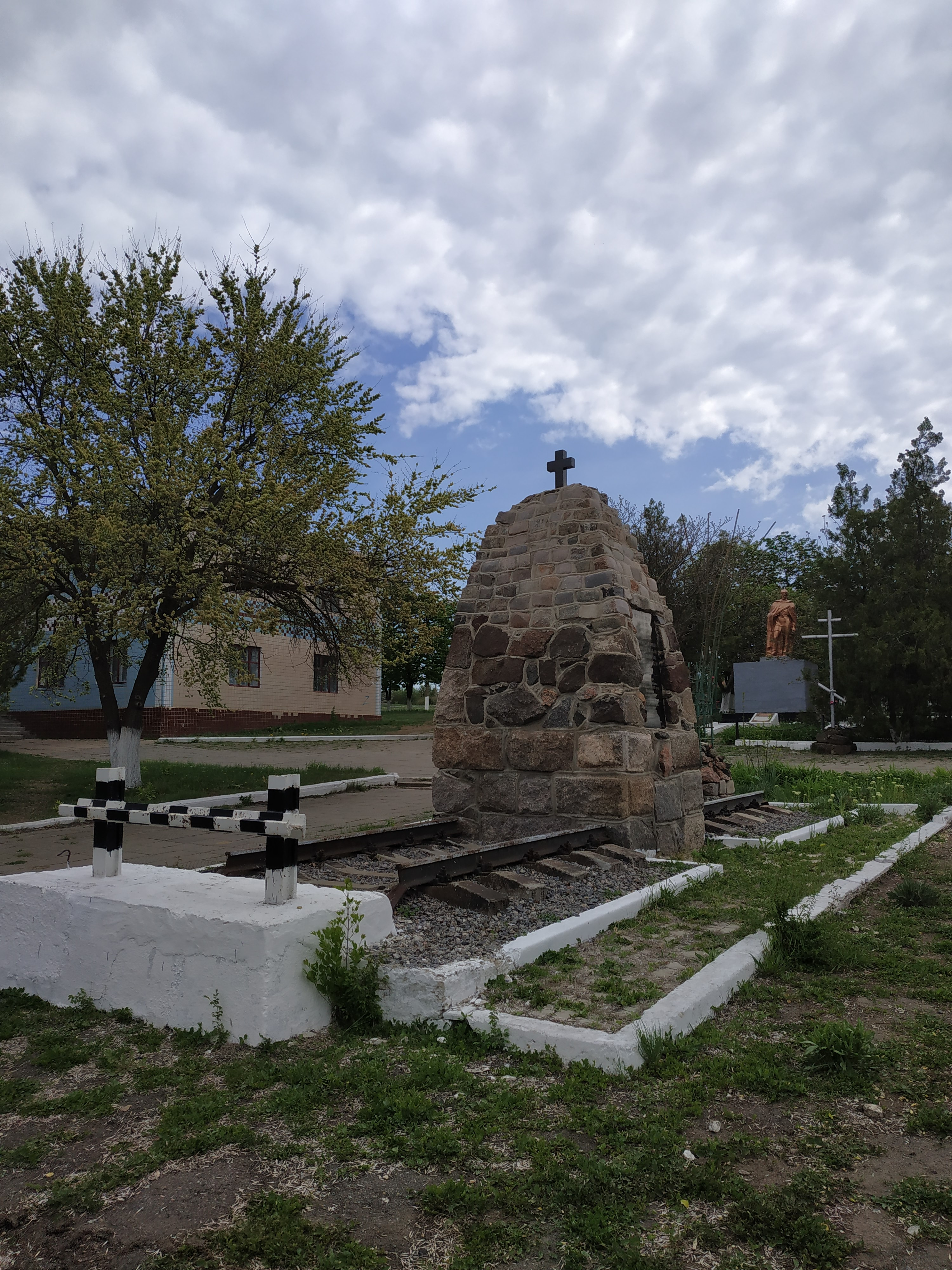 Встановлено в пам’ять примусово переселених у 1951 році українців з території теперіщньої Польщі с. Устянове Нижньо-Устрицького району